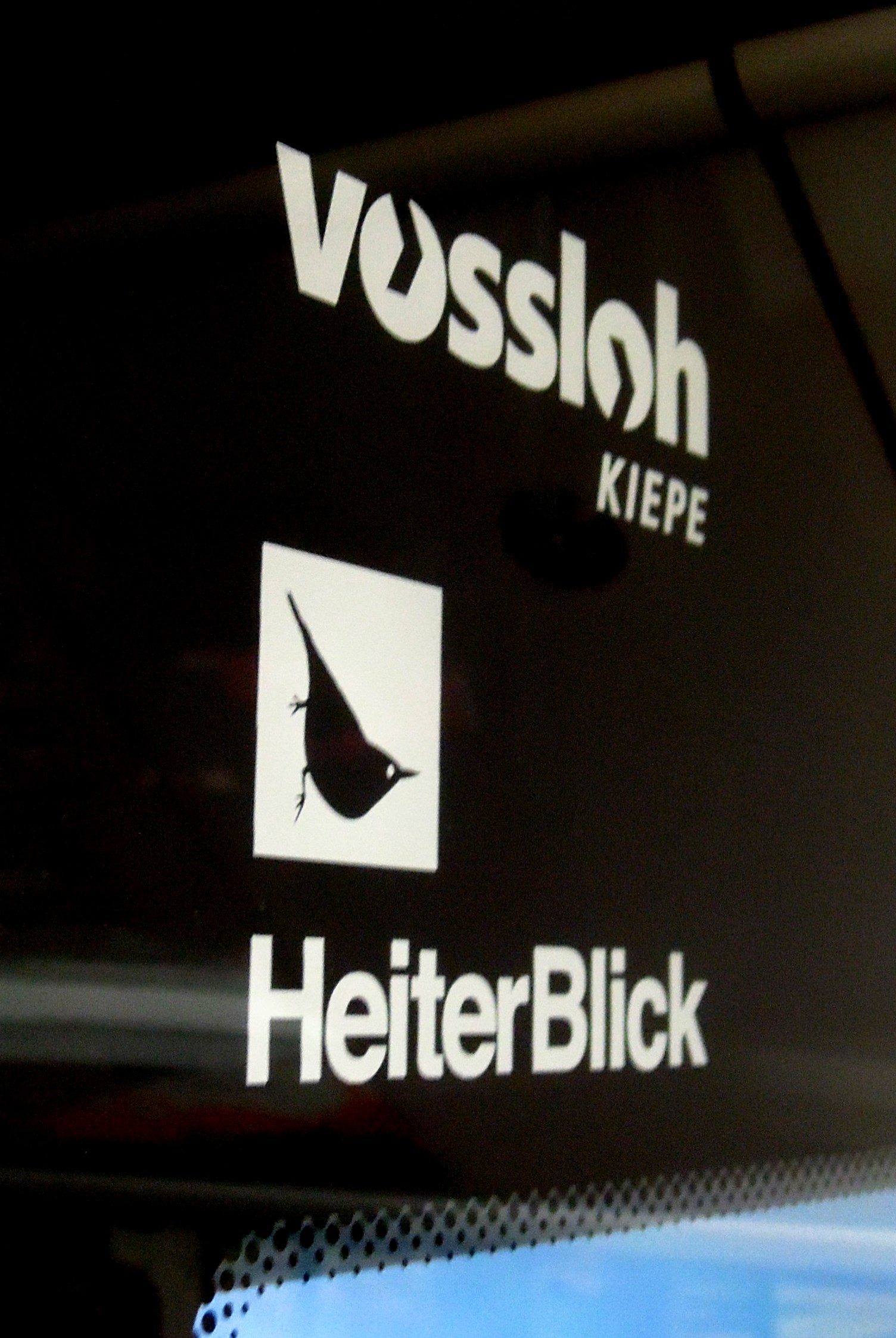 Die Logos der Hersteller Vossloh Kiepe (elektrischer Teil) und HeiterBlick (mechanischer Teil) an einem GTZ-8B (Vamos Bielefeld).